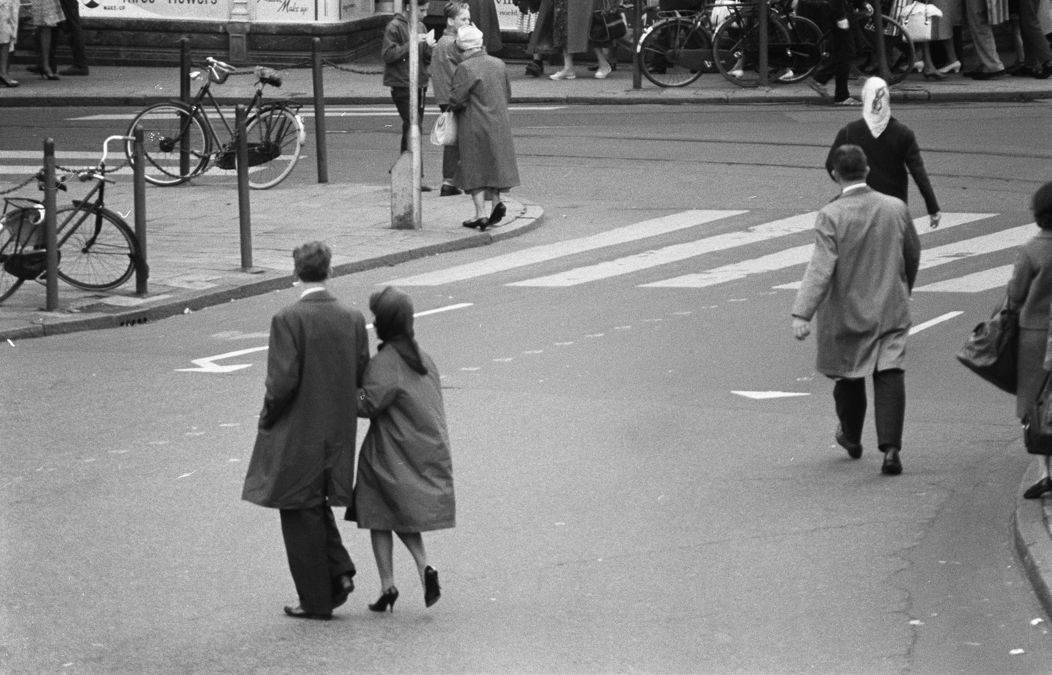 Collectie / Archief : Fotocollectie Anefo Reportage / Serie : [ onbekend ] Beschrijving : Voetgangers in Amsterdam lopen naar de zebrapaden Datum : 31 augustus 1960 Locatie : Amsterdam, Noord-Holland Trefwoorden : VOETGANGERS, ZEBRAS Fotograaf : Rossem, Wim van / Anefo Auteursrechthebbende : Nationaal Archief Materiaalsoort : Negatief (zwart/wit) Nummer archiefinventaris : bekijk toegang 2.24.01.05 Bestanddeelnummer : 911-5513